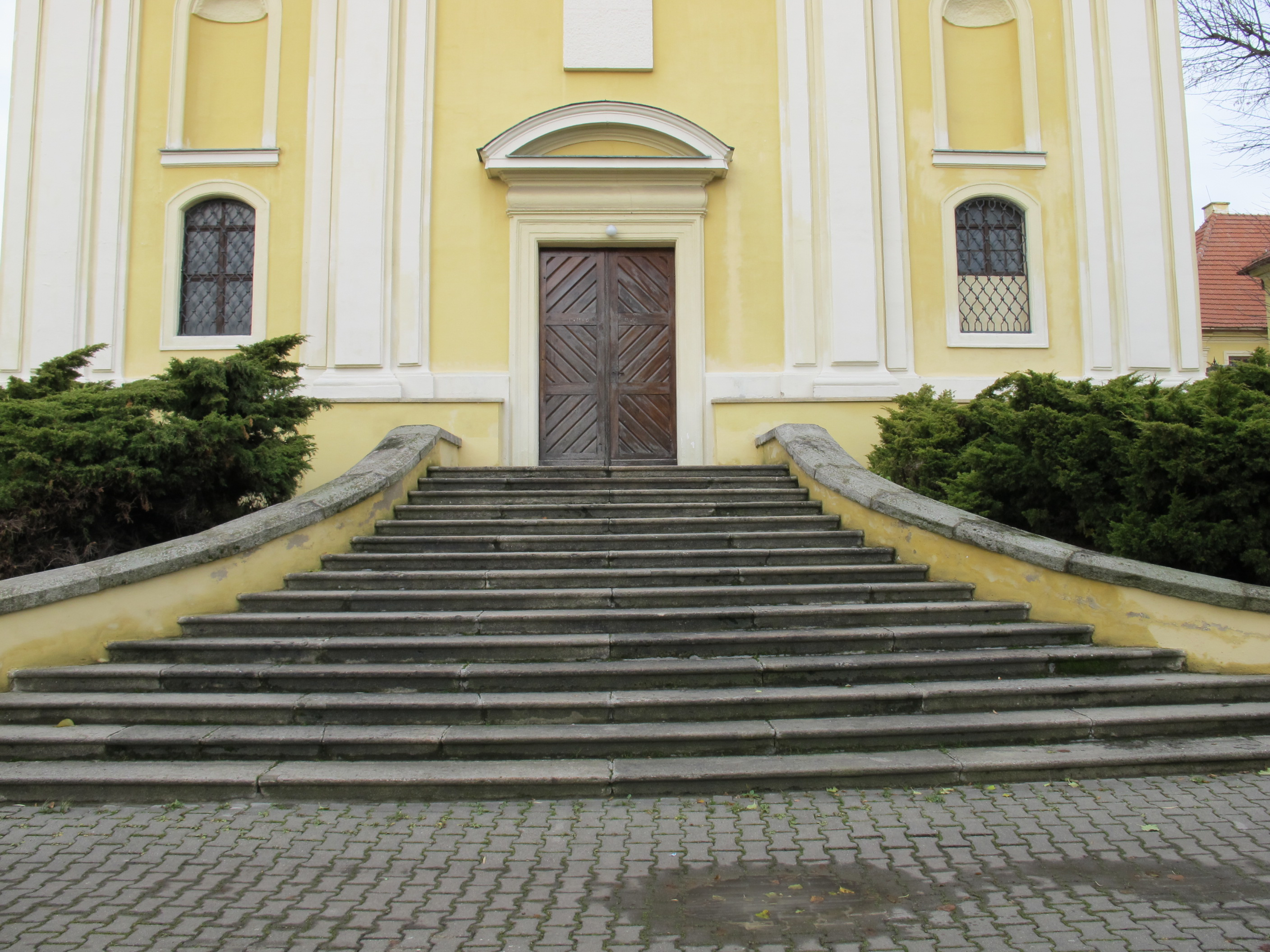 Kostel sv. Michaela archanděla, Masarykovo náměstí, Litvínov, schody a portál